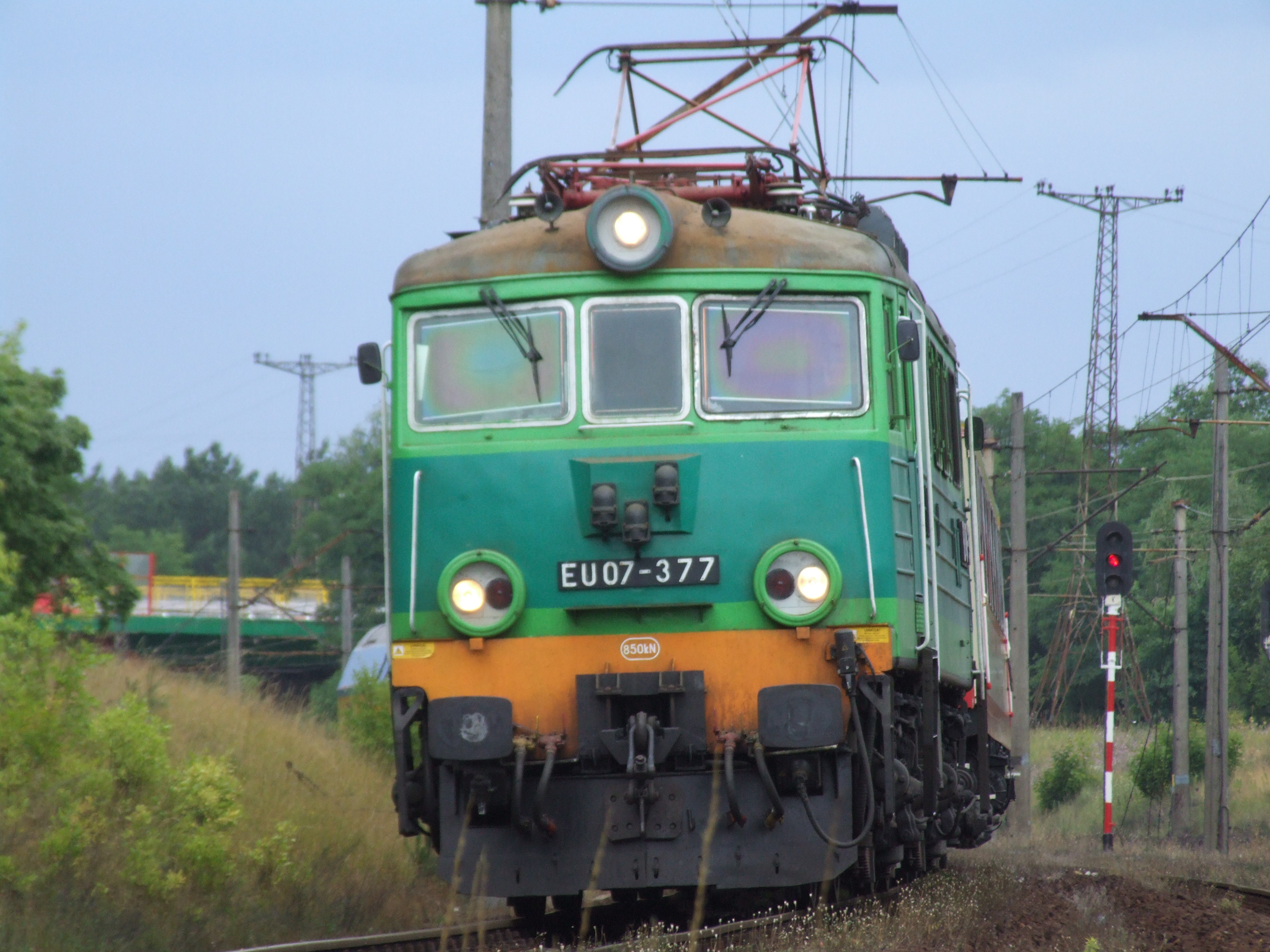 Dworzec Bydgoszcz Leśna